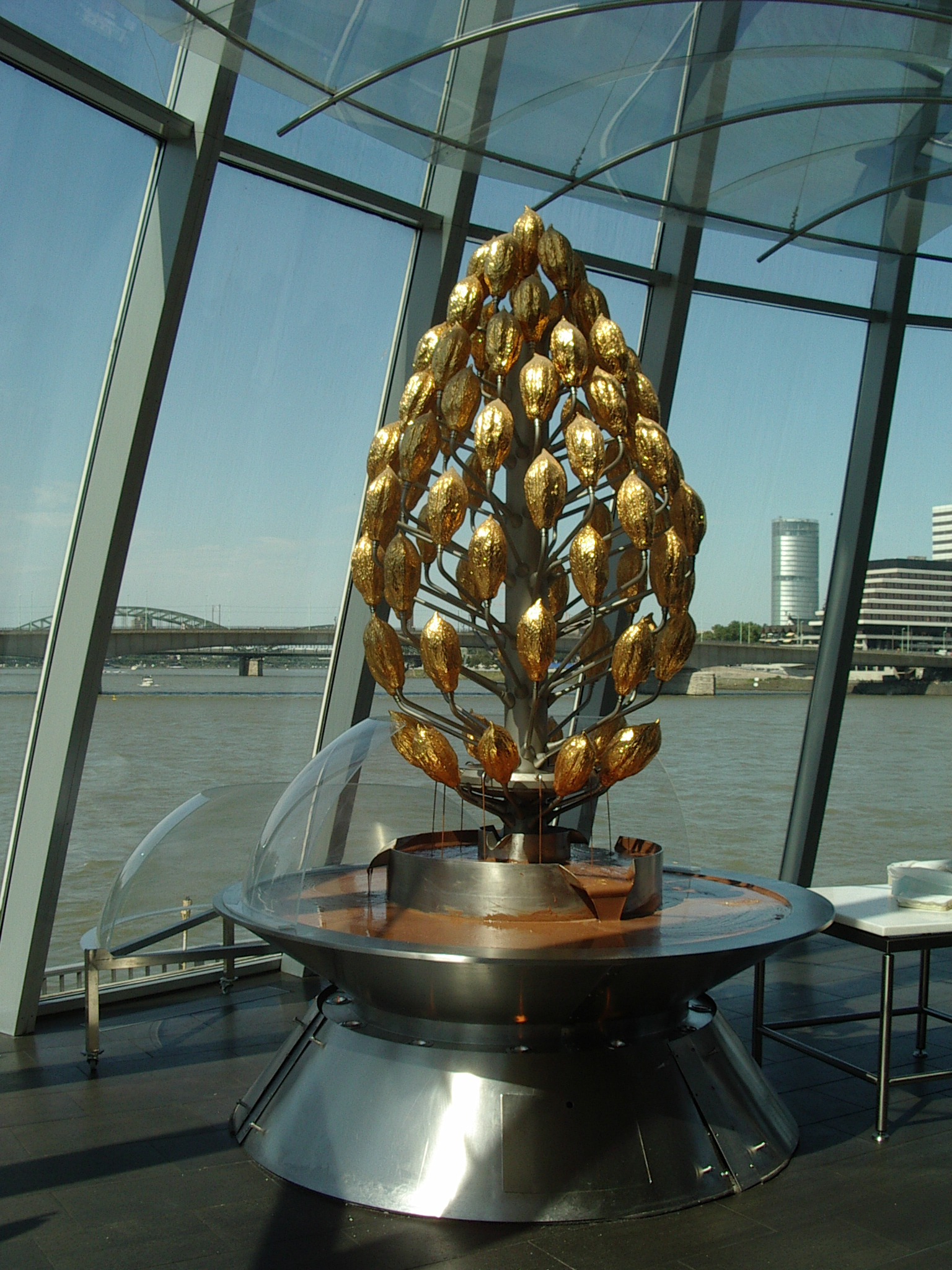 Fontana di cioccolato nel Museo di Cioccolato a Colonia